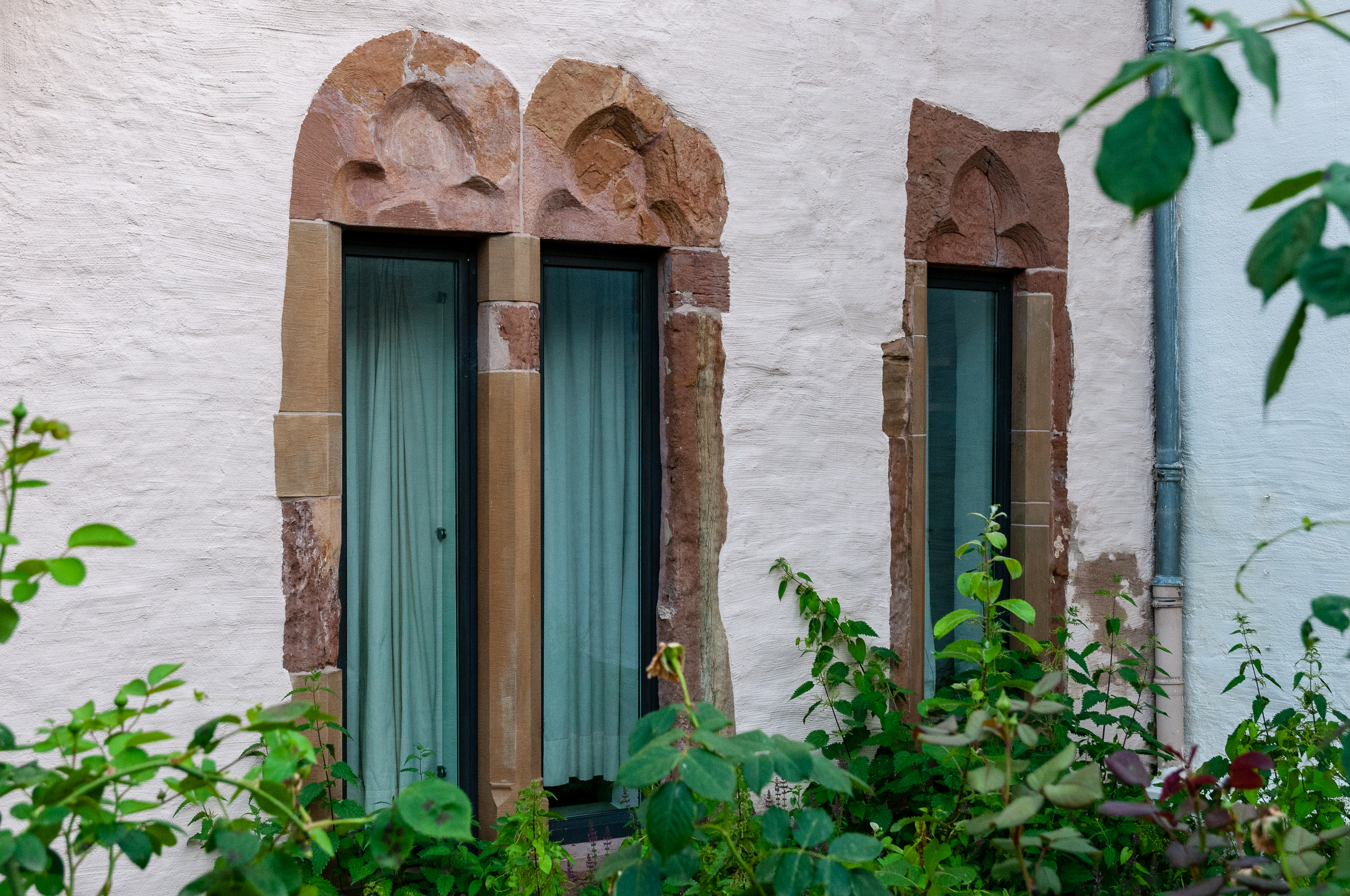 D'Gotescht Haus op Nr 20d, rue André-Duchscher (Ééwisht Baach) zu Iechternach.